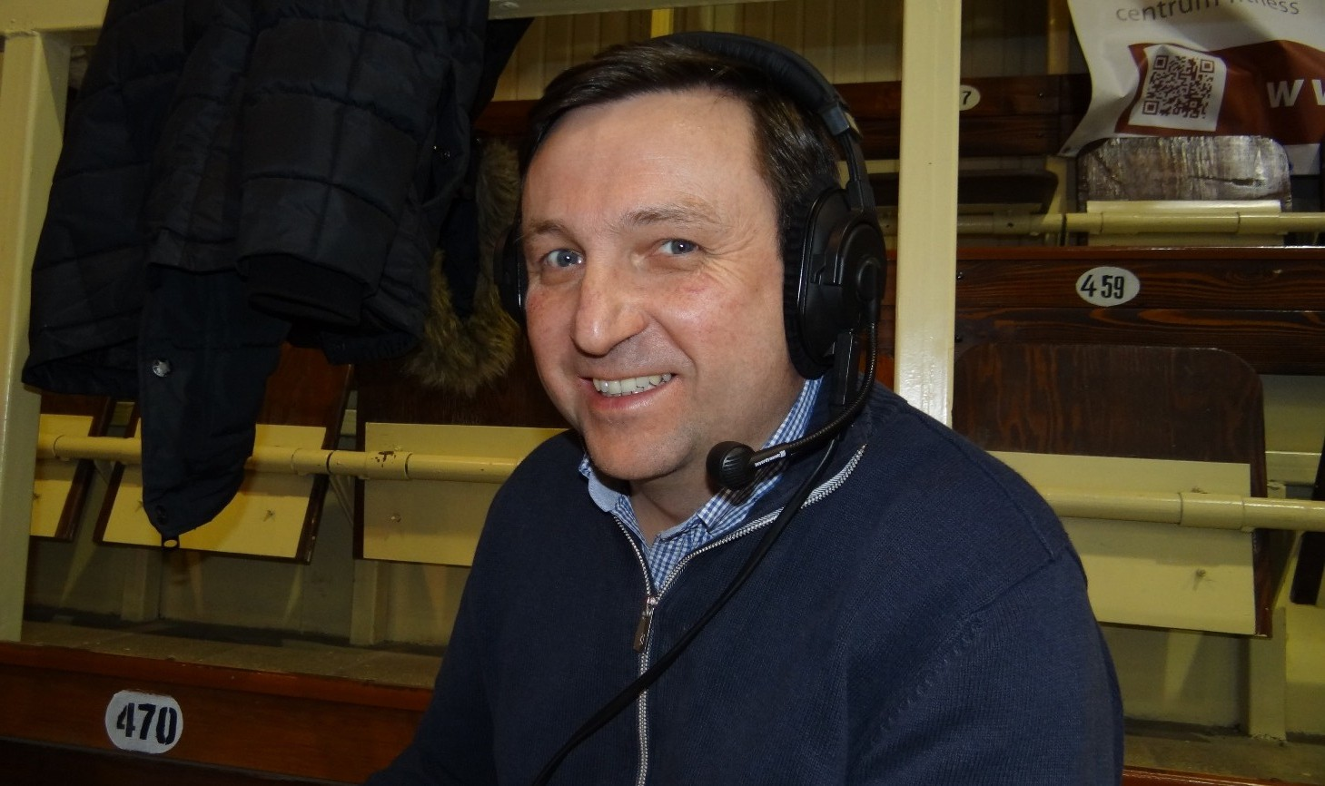 Artur Dyczewski, radio Szczecin (2018)